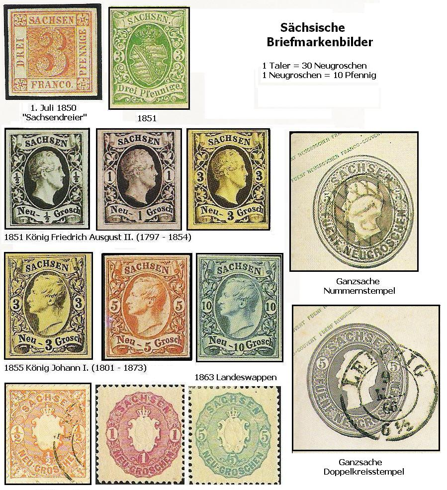 Sächsische Briefmarkenbilder gescannt W.Steven 17:23, 17. Jan. 2007 (CET) 2007